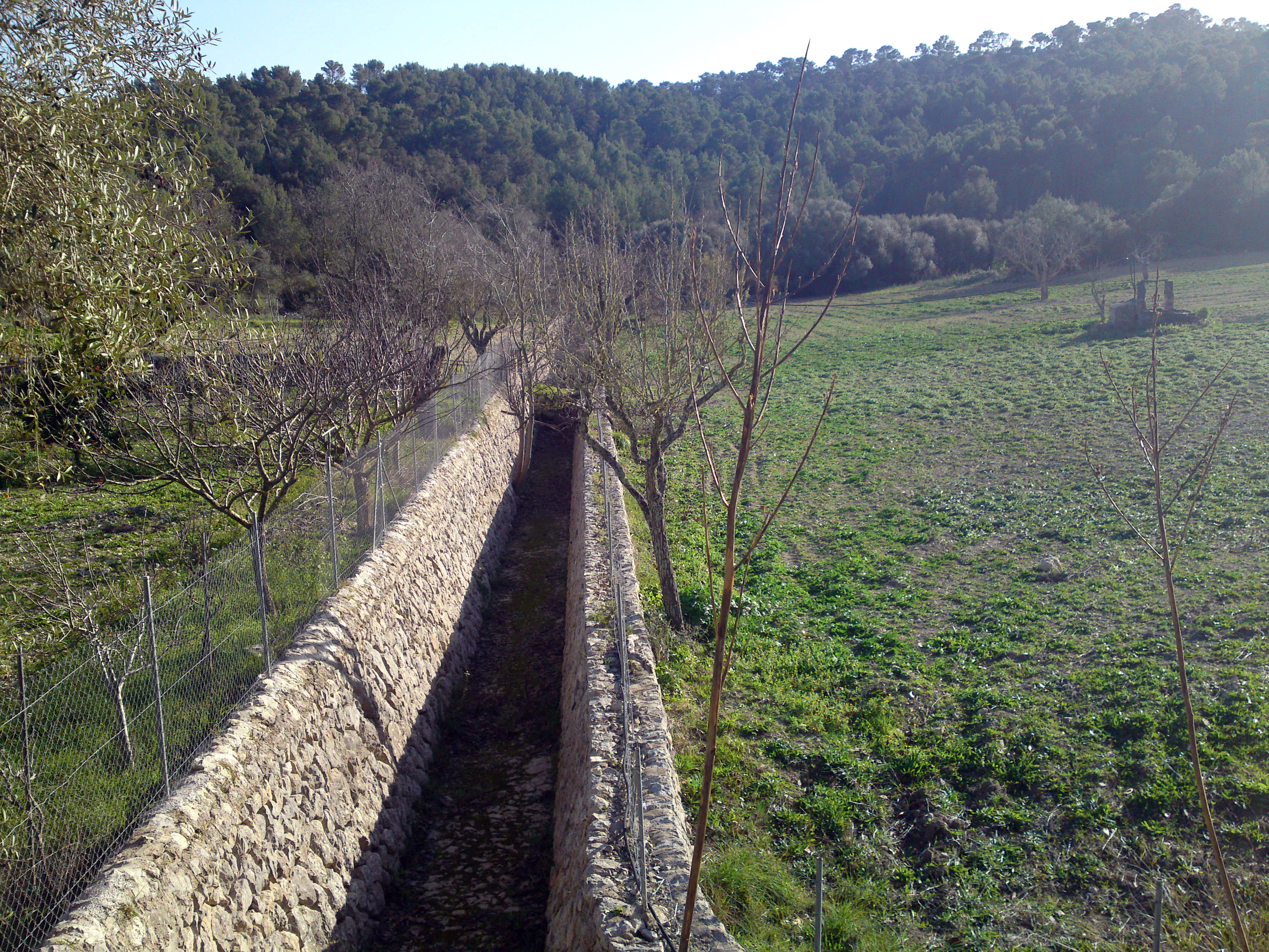 Inici siquia Aleix